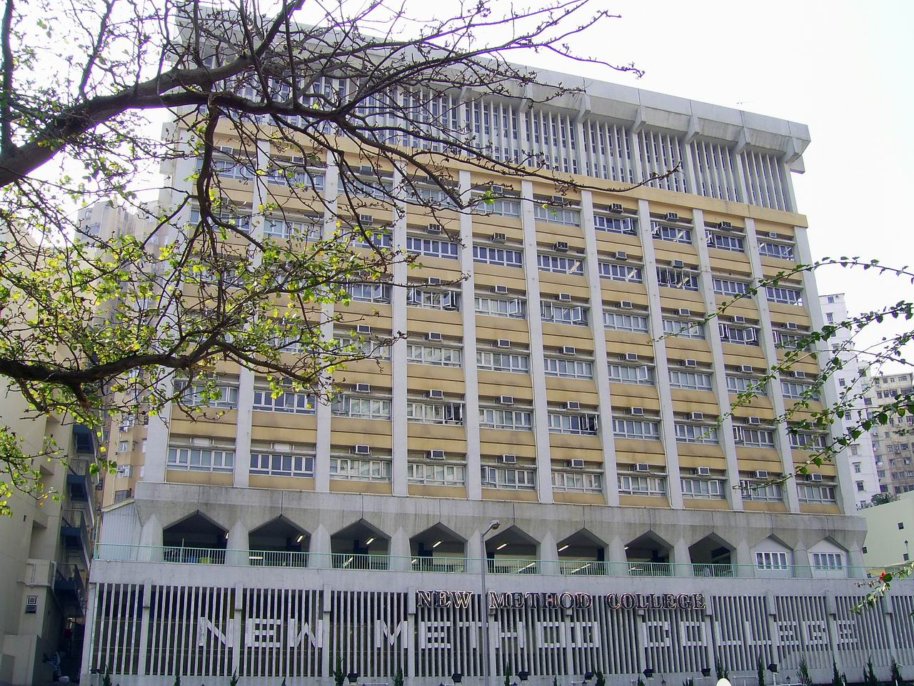 新法書院窩打老道山分校